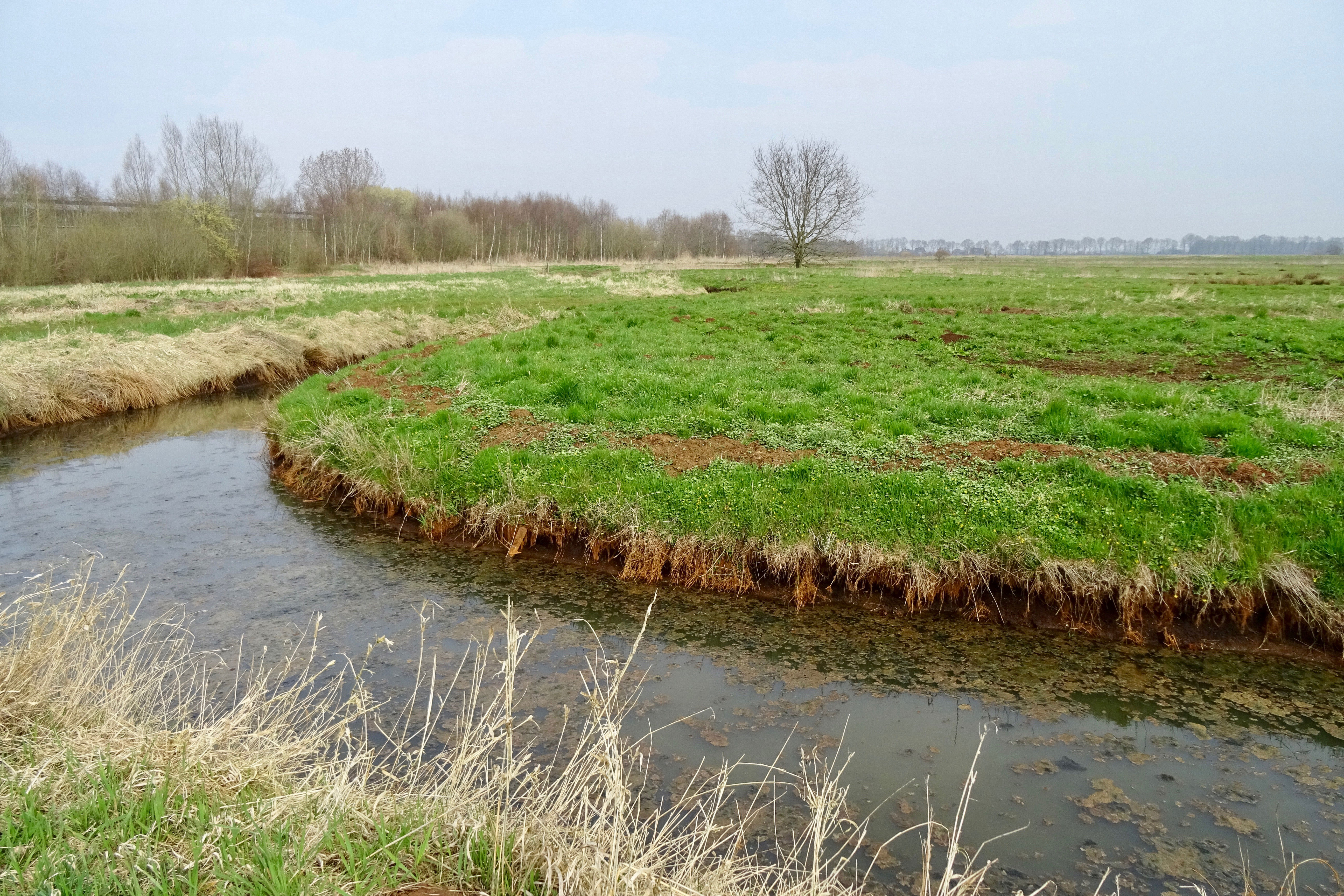 Langs de boorden van de Oude AE in het natuurgebied De Wiede tussen Veendam en Muntendam